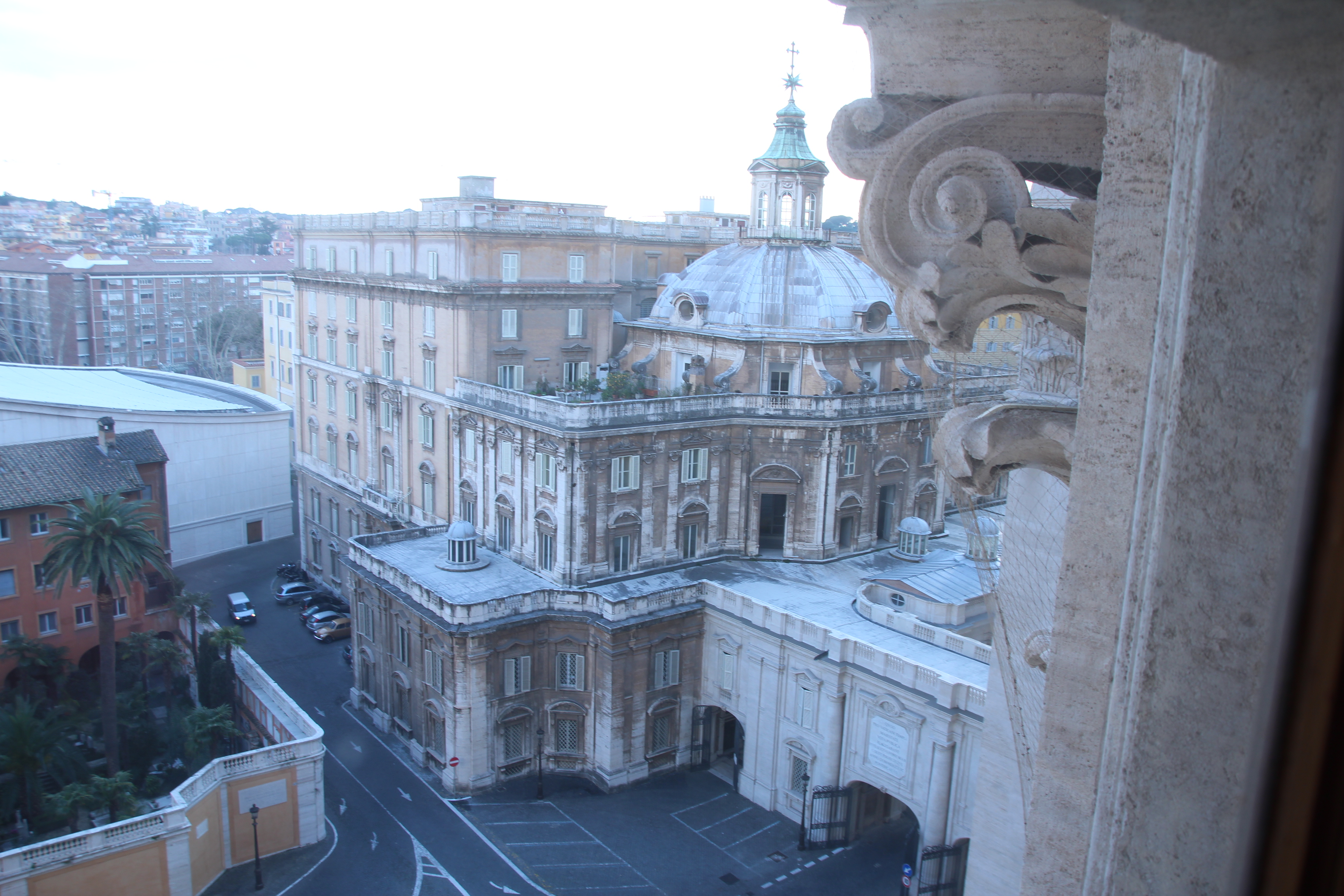 Sakristei des Petersdoms aus einem Seitenfenster des Doms